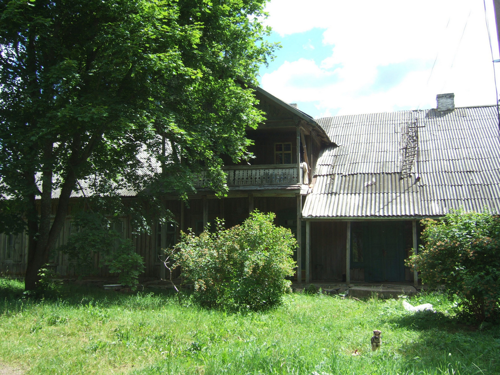 Čiulų dvaro sodyba